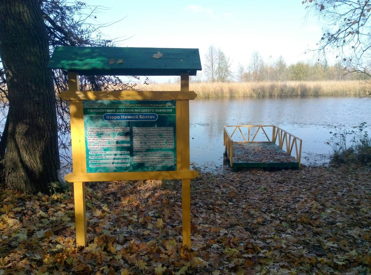 Нижній Болгач, Ріпкінський район